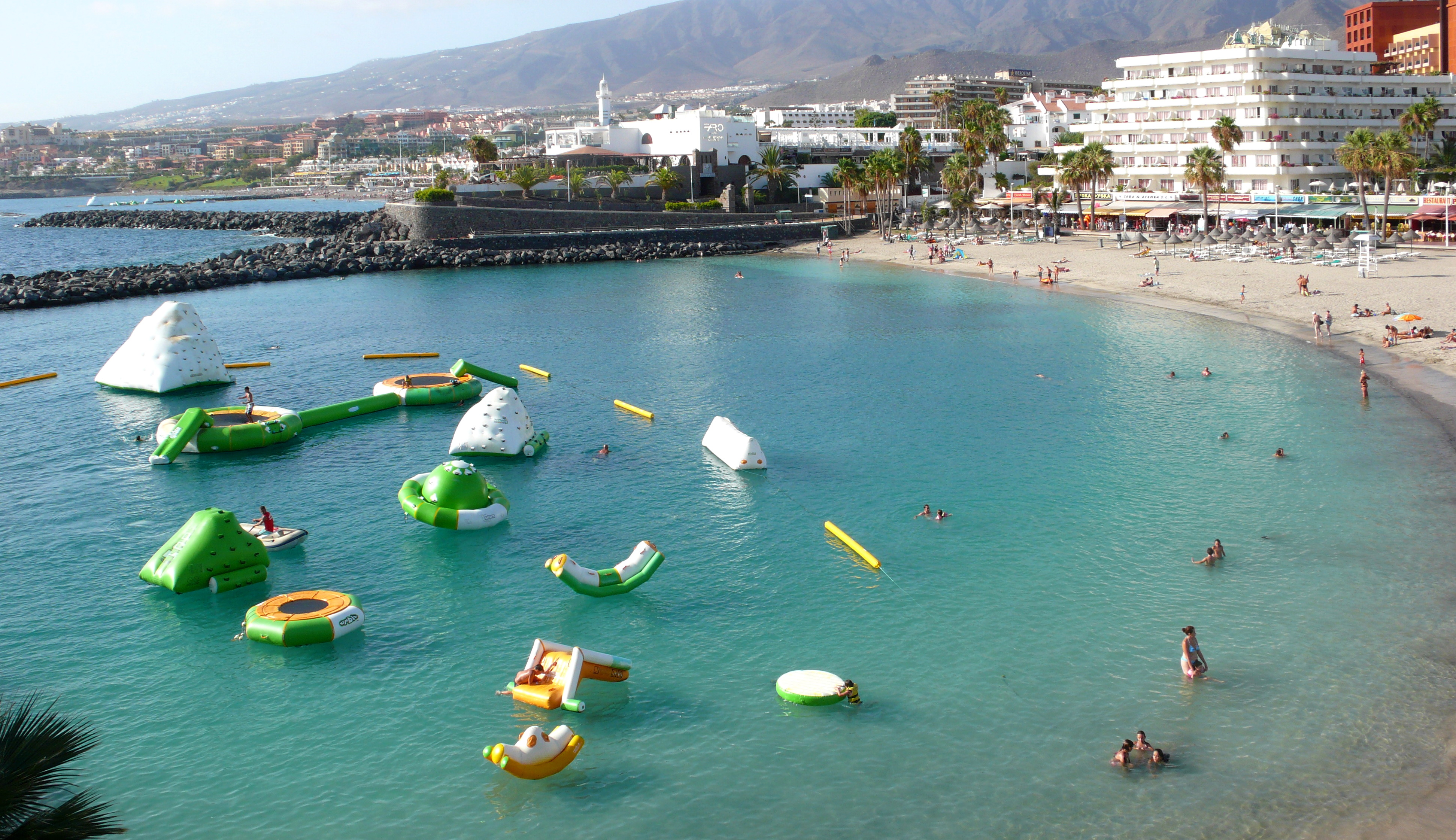 Vista de la playa de Torviscas